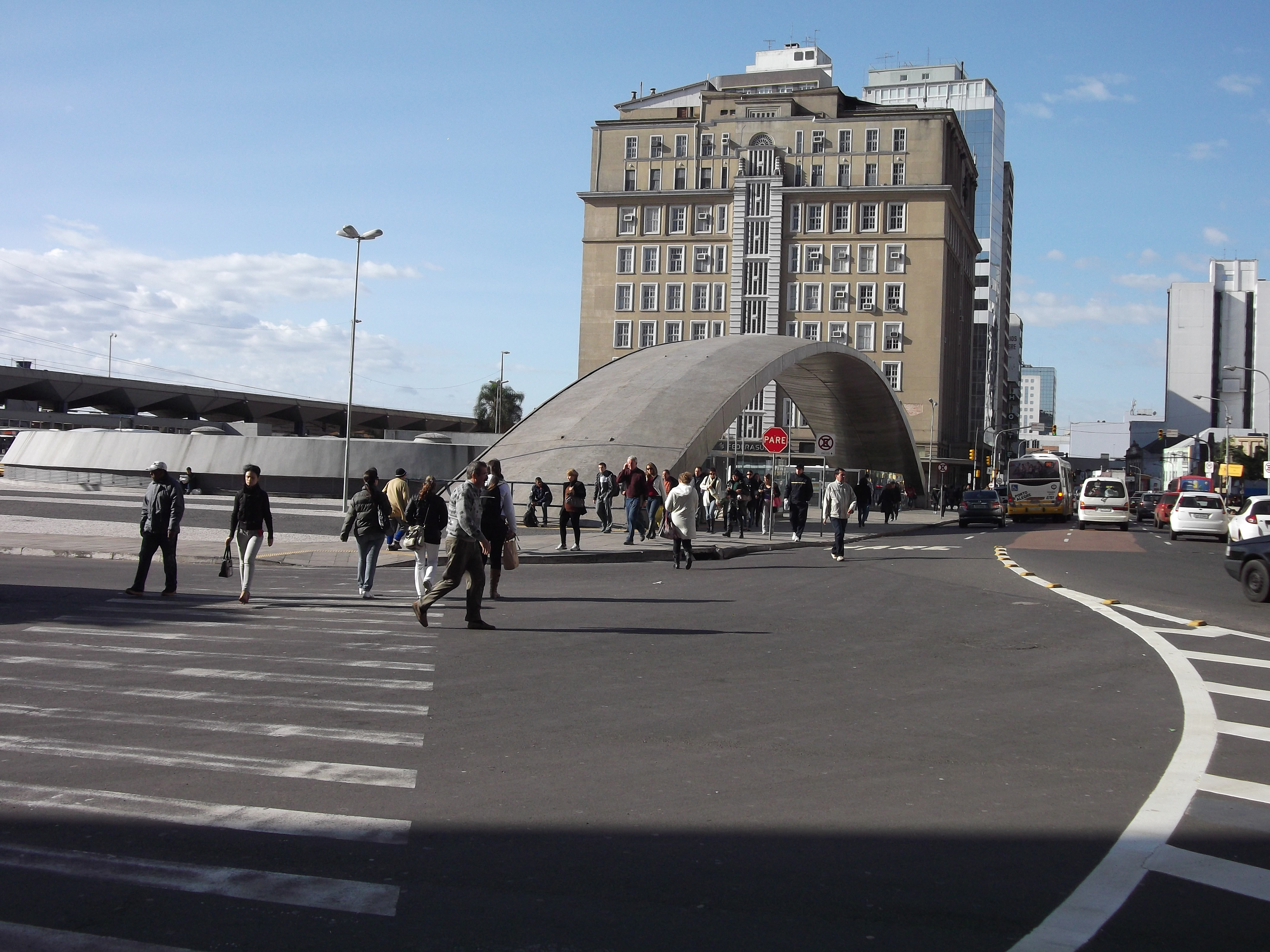 Porto Alegre Trensurb : Estação Mercado. Ao fundo o Palácio do Comércio.